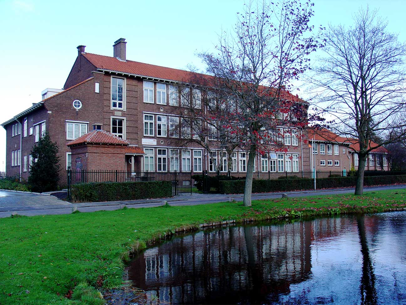 Coornhert Gymnasium aan het Jan van Renesseplein in Gouda. Het gebouw is ontworpen door Ad van der Steur.